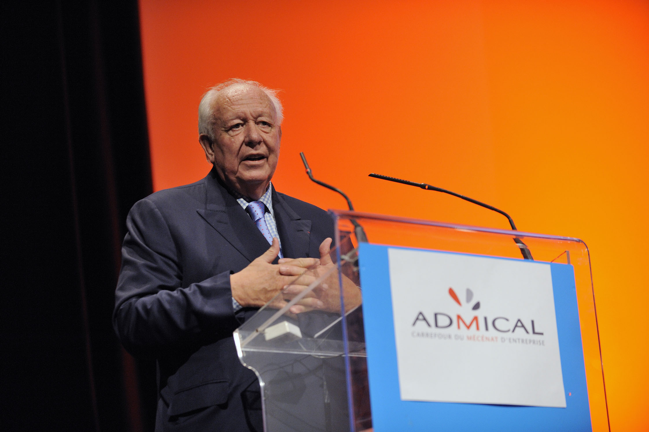 © François Moura